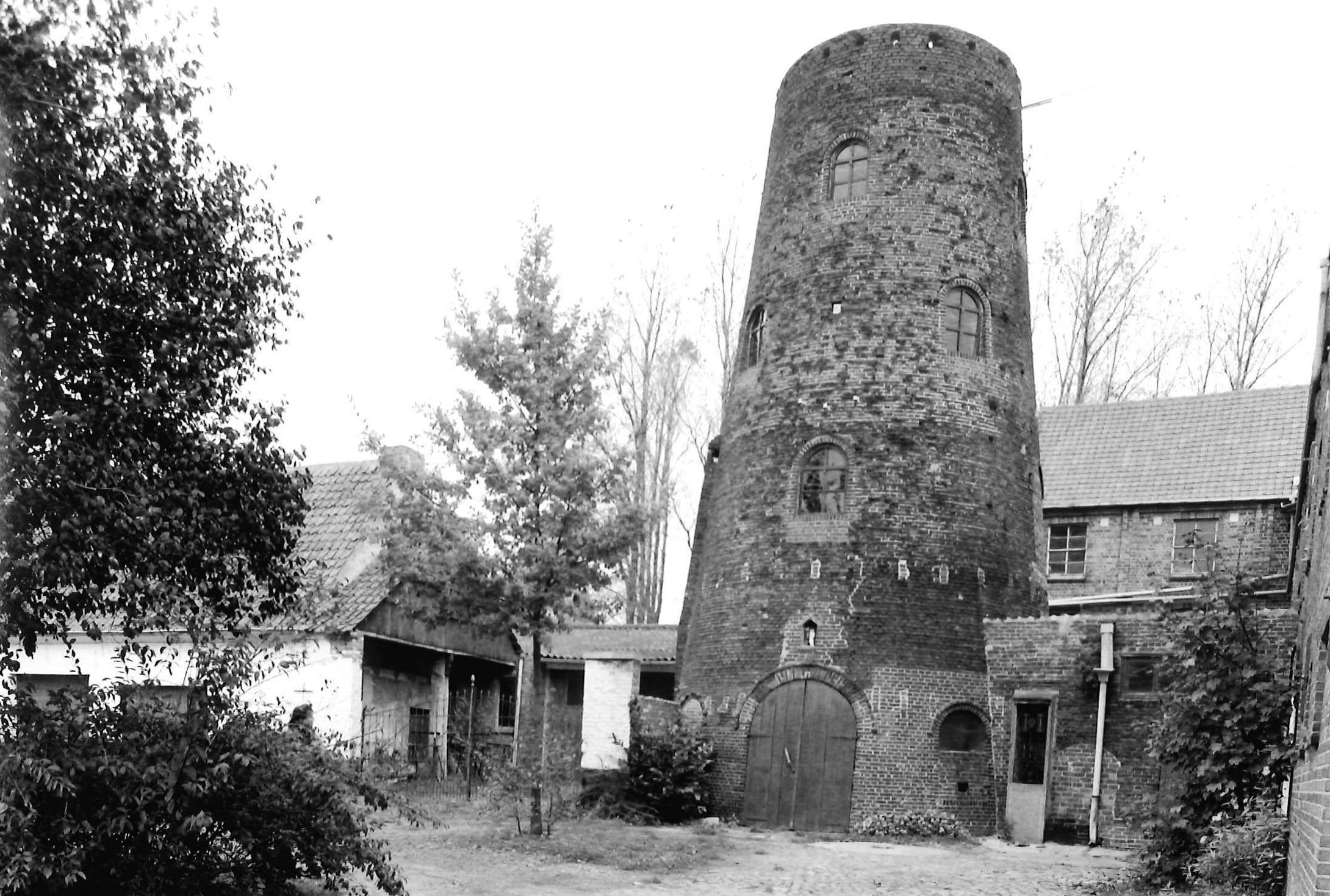 Aalter Looierijstraat zonder nummer, 17